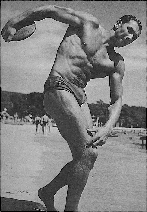 Marcel Rouet dans la pose du Discobole de Myron en 1960